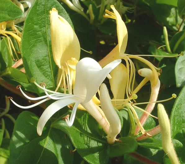 Chèvrefeuille du Japon, Vantoux-et-Longevelle